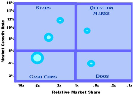 BCG Matrix Example